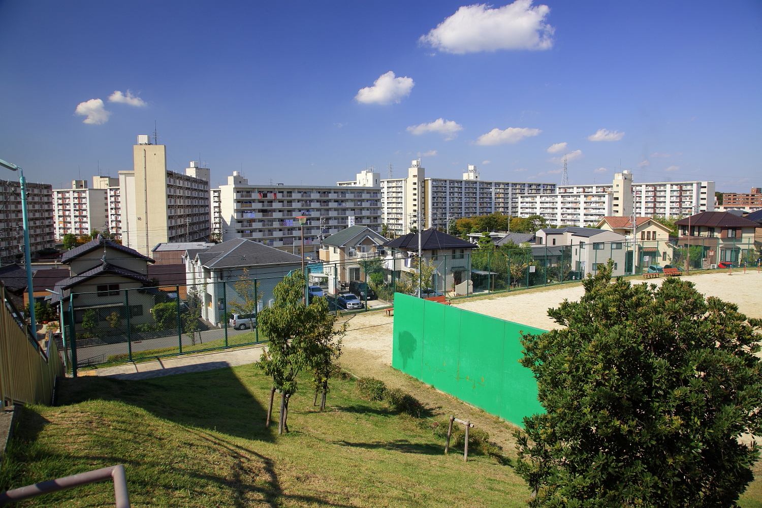 上の山より桶狭間荘を望む（名古屋市緑区桶狭間上の山、2012年（平成24年）10月）